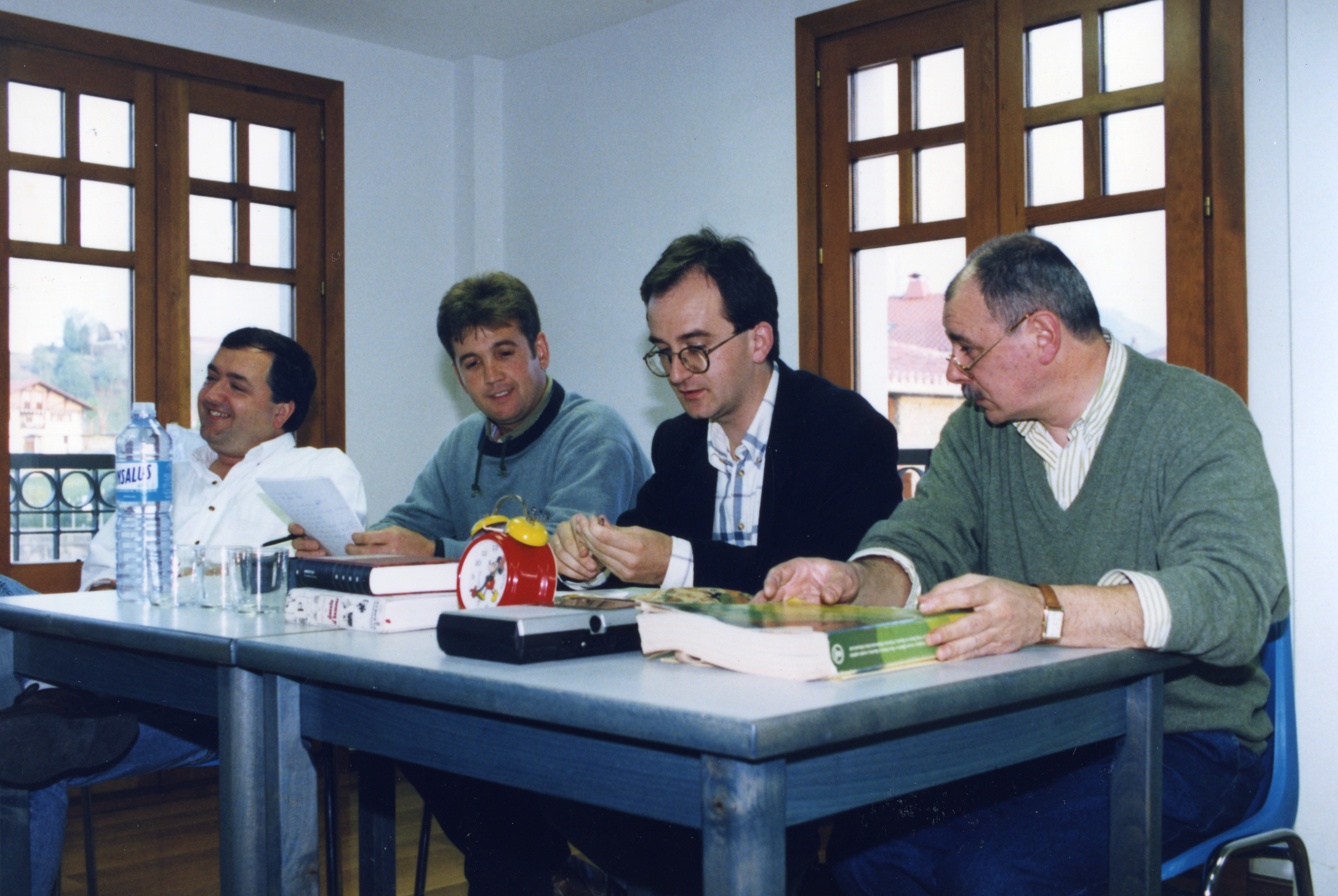 San Millan guraso elkarteak antolatuta. Aiurri 14 zbk. 13. orr.